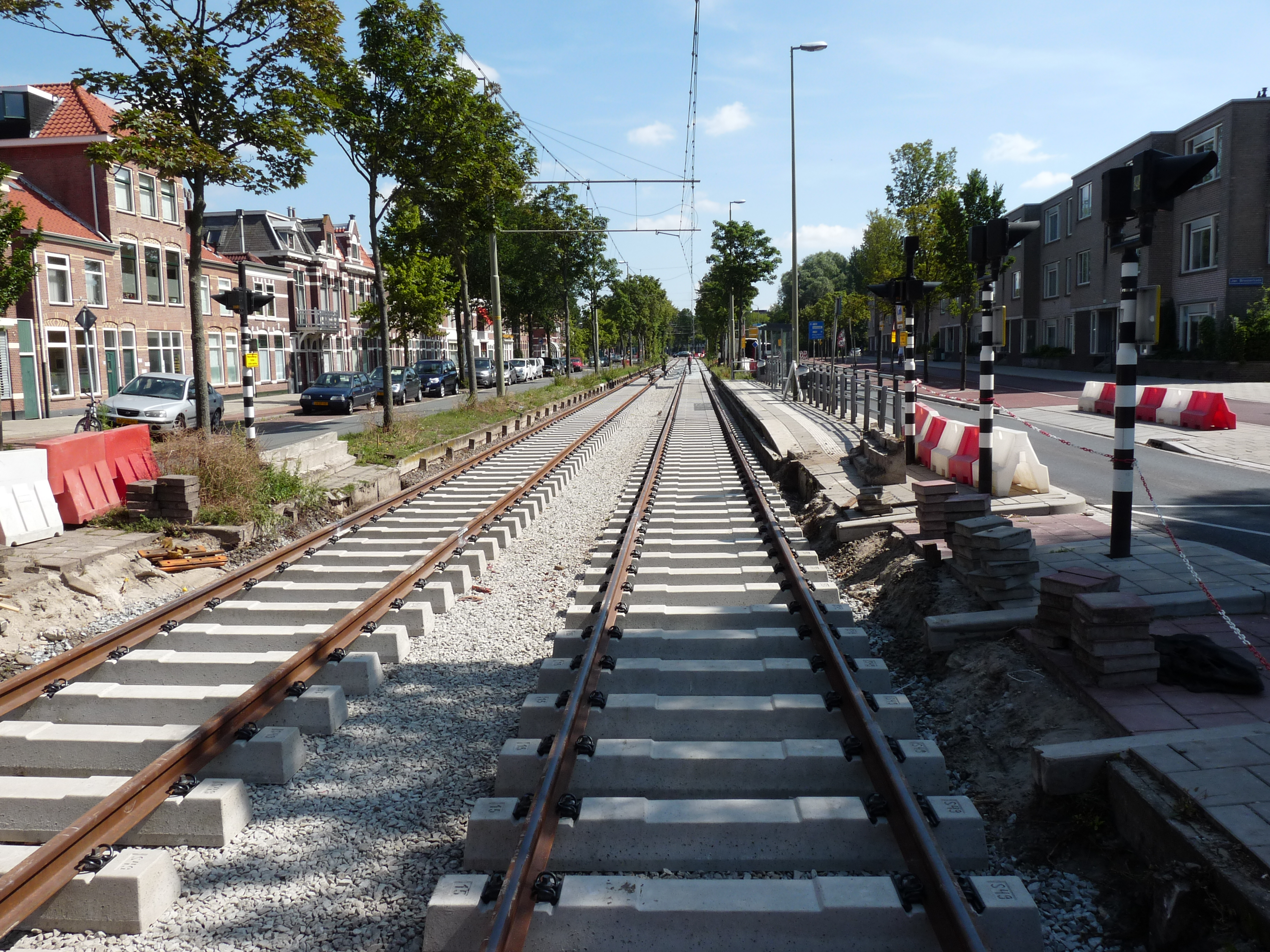 Renovatie sporen bij de tramhalte Buitentuinen